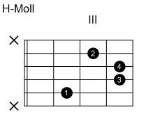 Eigenanfertigung